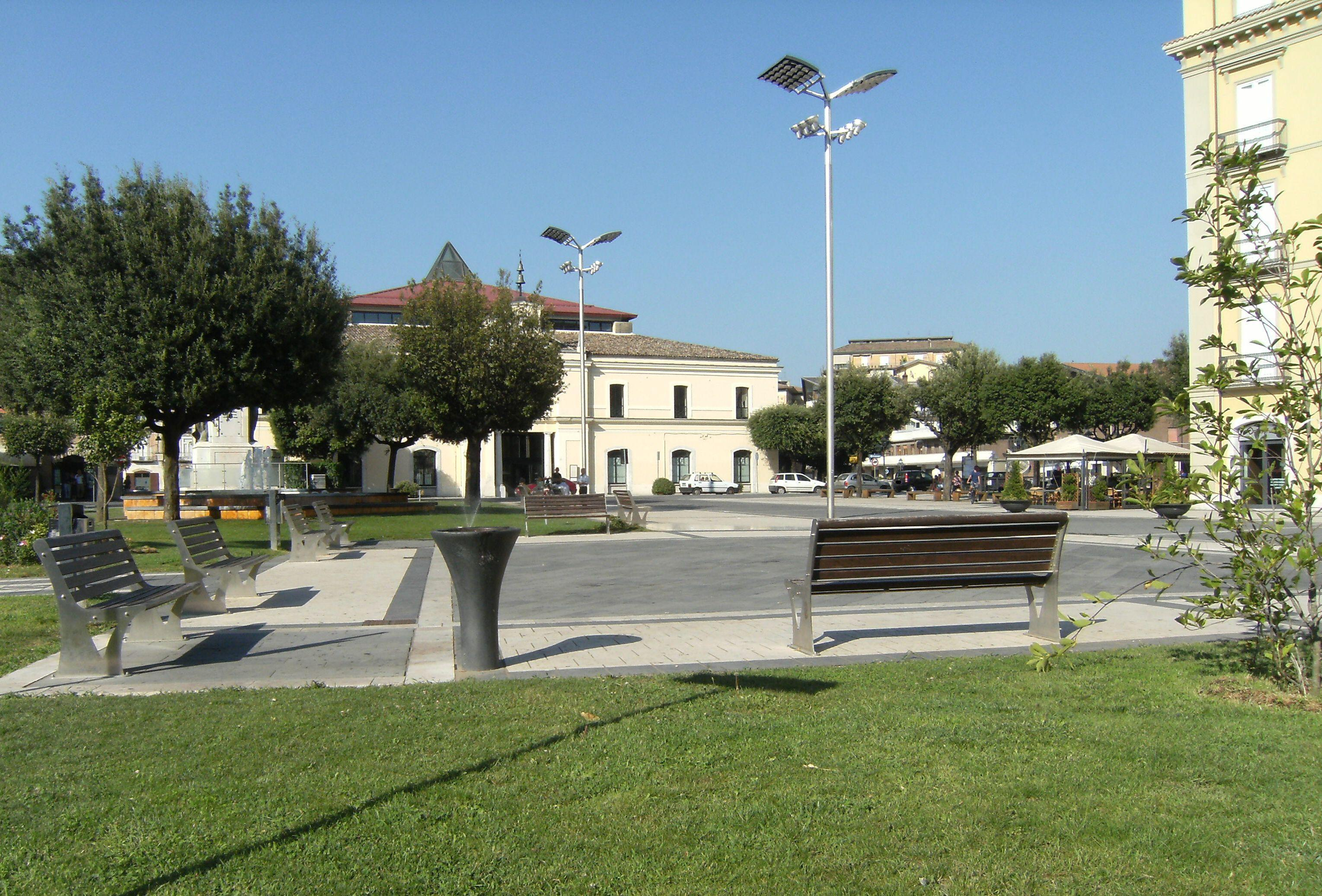 Piazza Umberto I, Atripalda, Provincia di Avellino